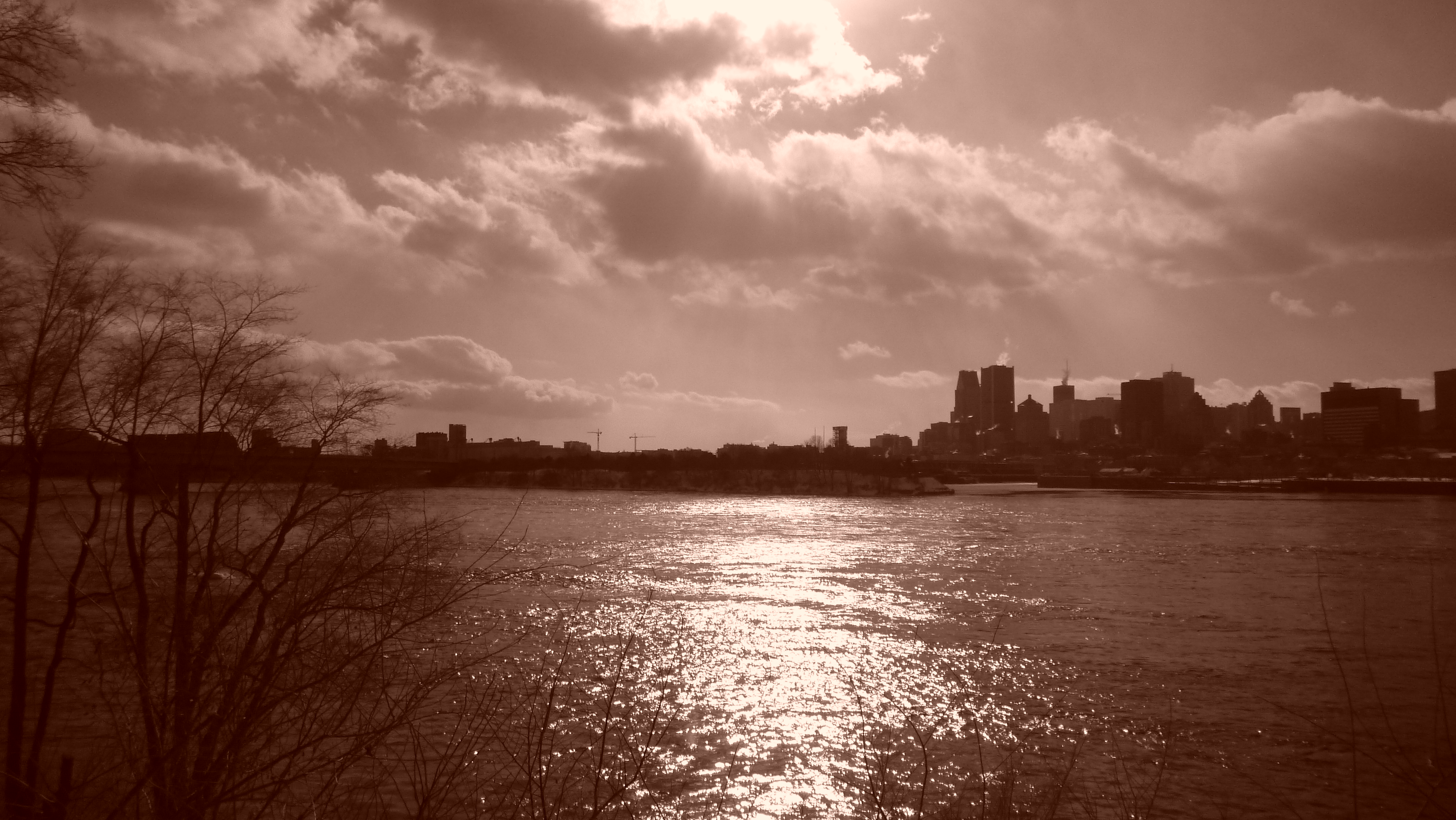 Vue de Montréal, depuis le parc Jean-Drapeau.